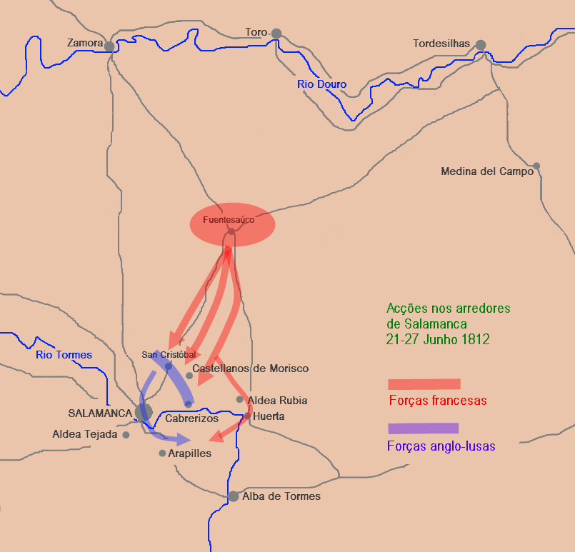 Esquema das principais acções desenvolvidas por ambos os exércitos, nos arredores de Salamanca, entre 21 e 27 de Junho de 1812.